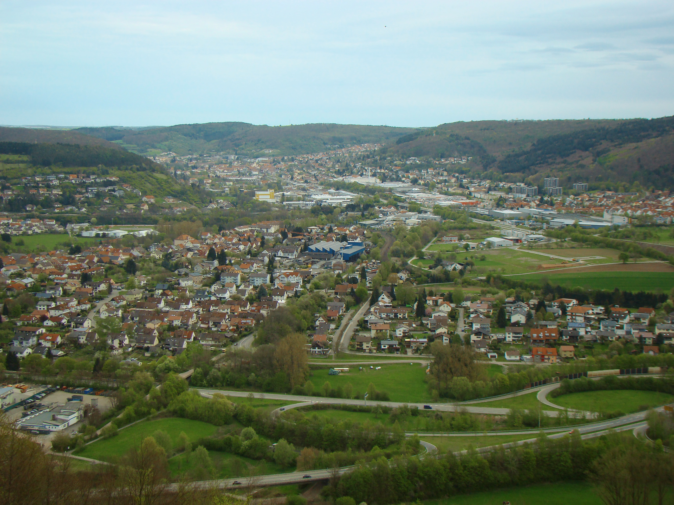 Blick über den Elzmündungsraum: vorne Neckarelz, hinten Mosbach